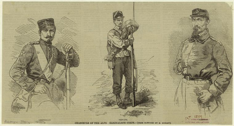 Les Chasseurs des Alps de Garibaldi.